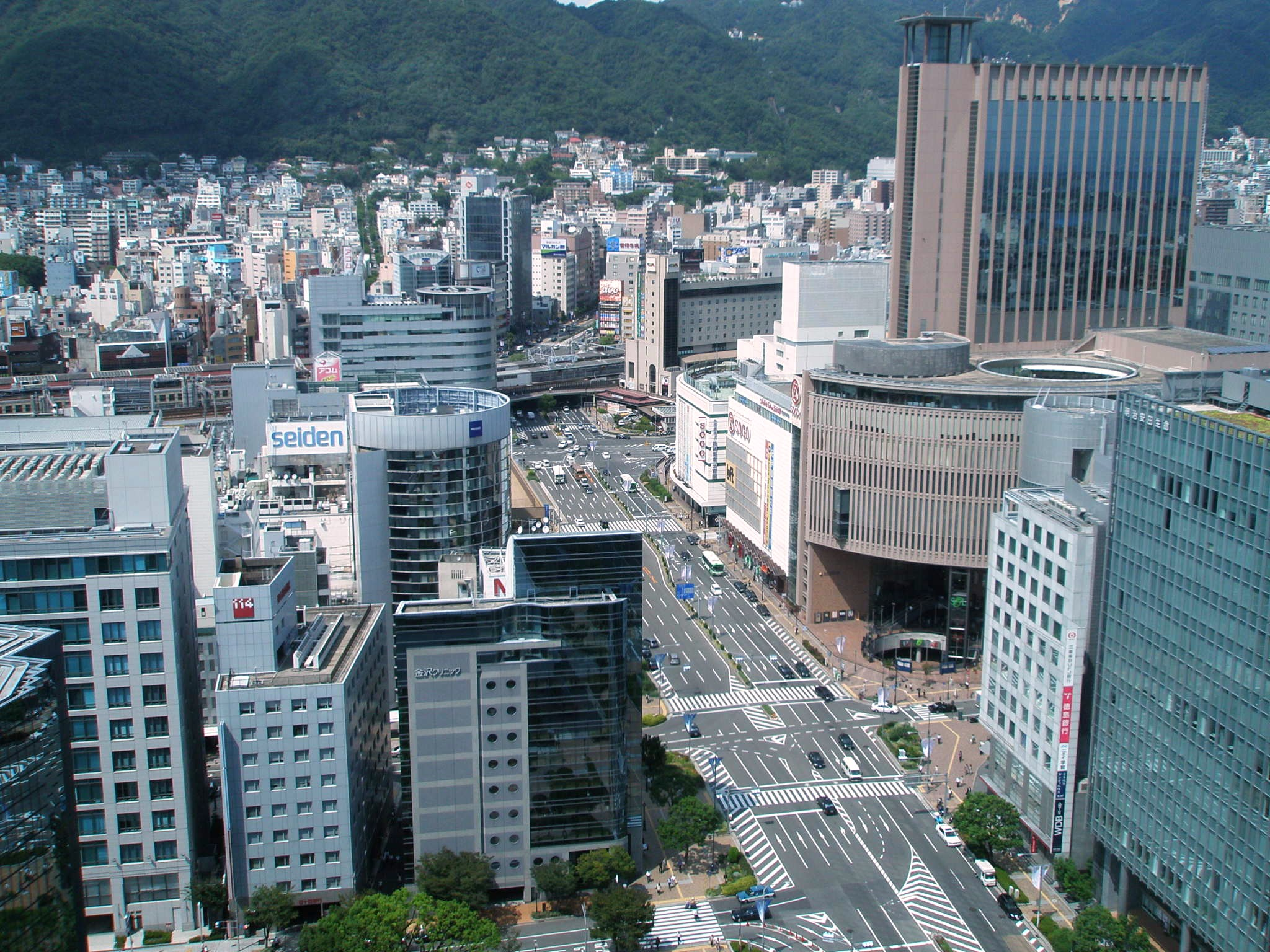 神戸市役所本庁舎からの眺め、三宮駅方向